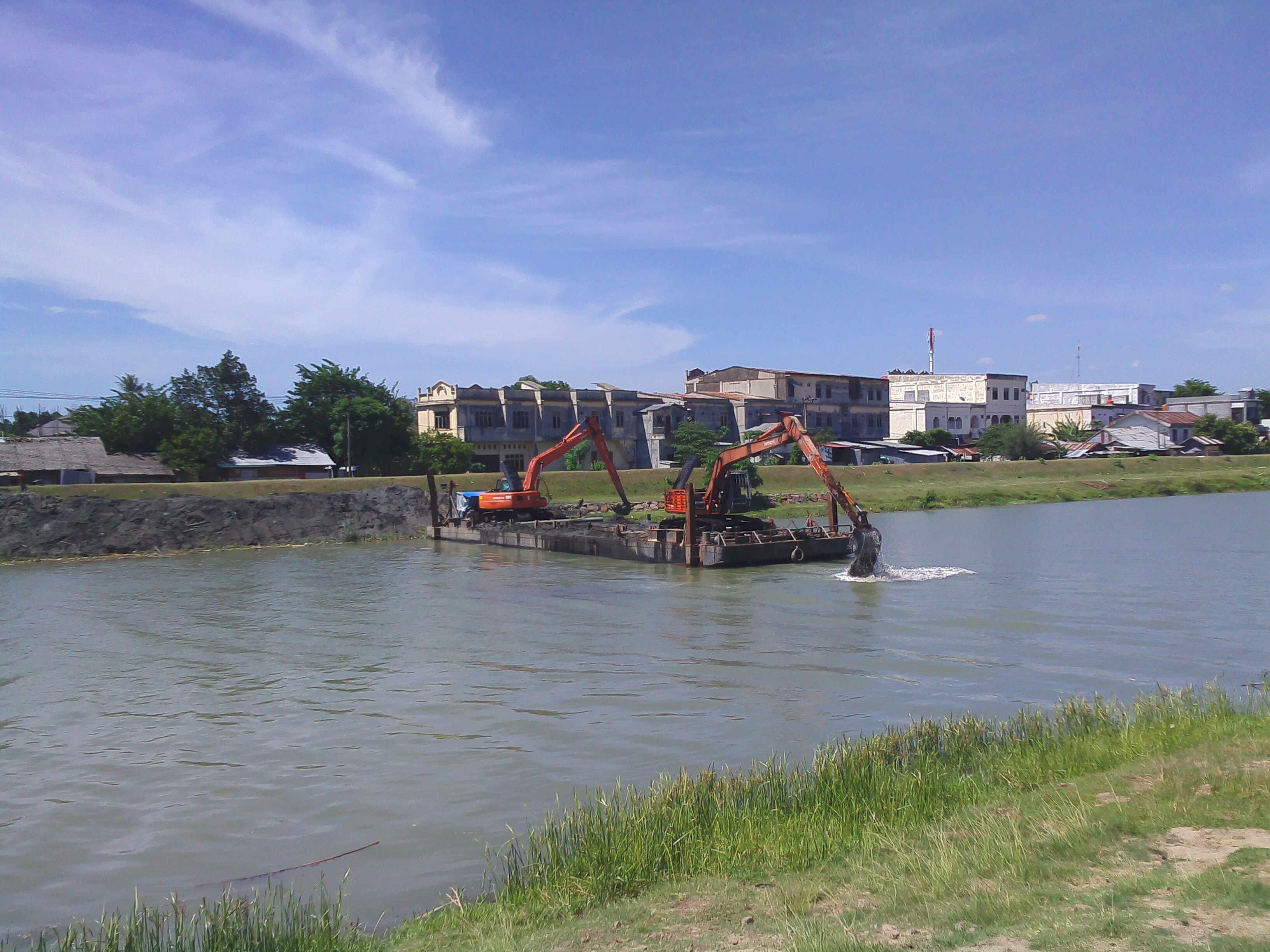 Pengerukan Krueng Aceh